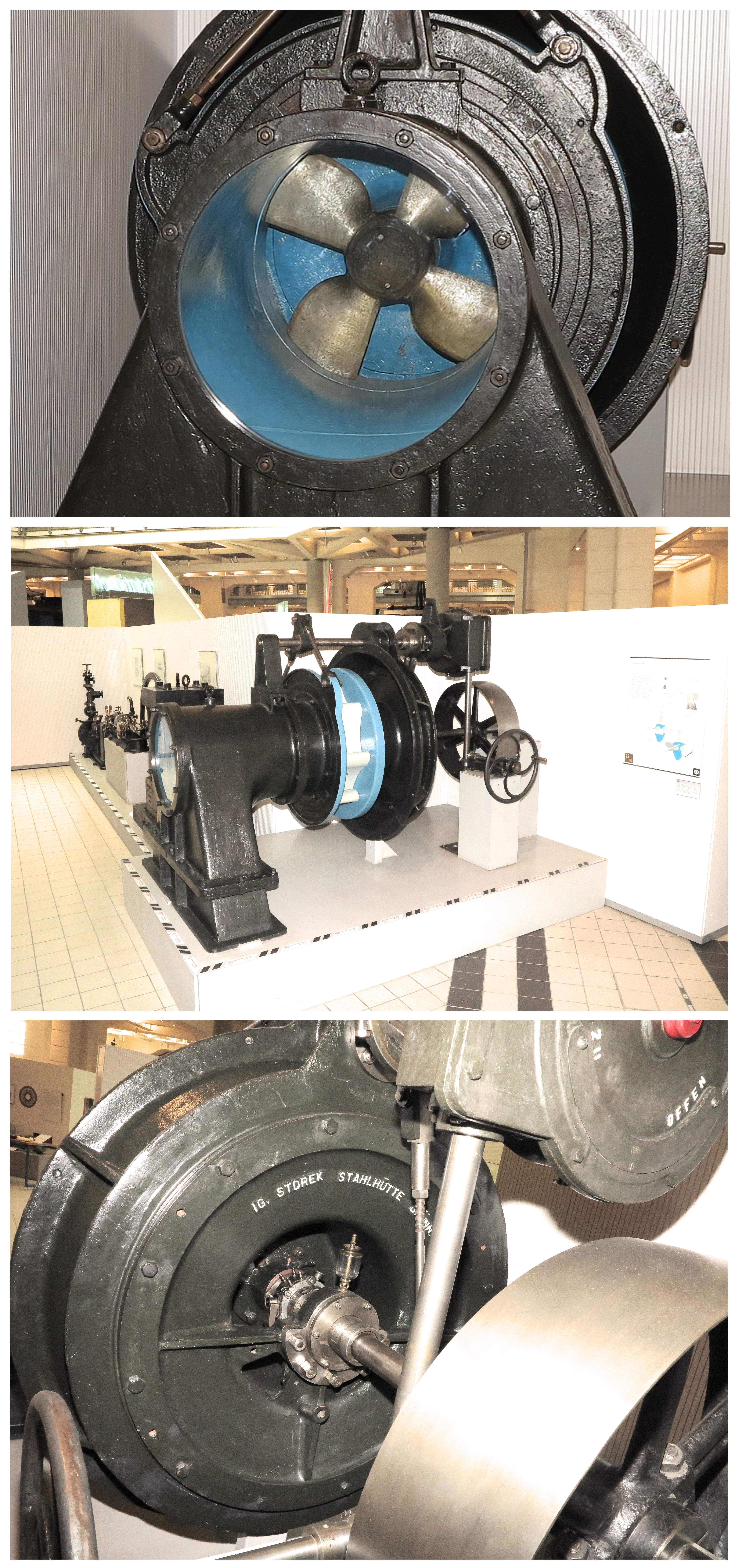 Erste Kaplan Turbine, heute ausgestellt im Technischen Museum in Wien